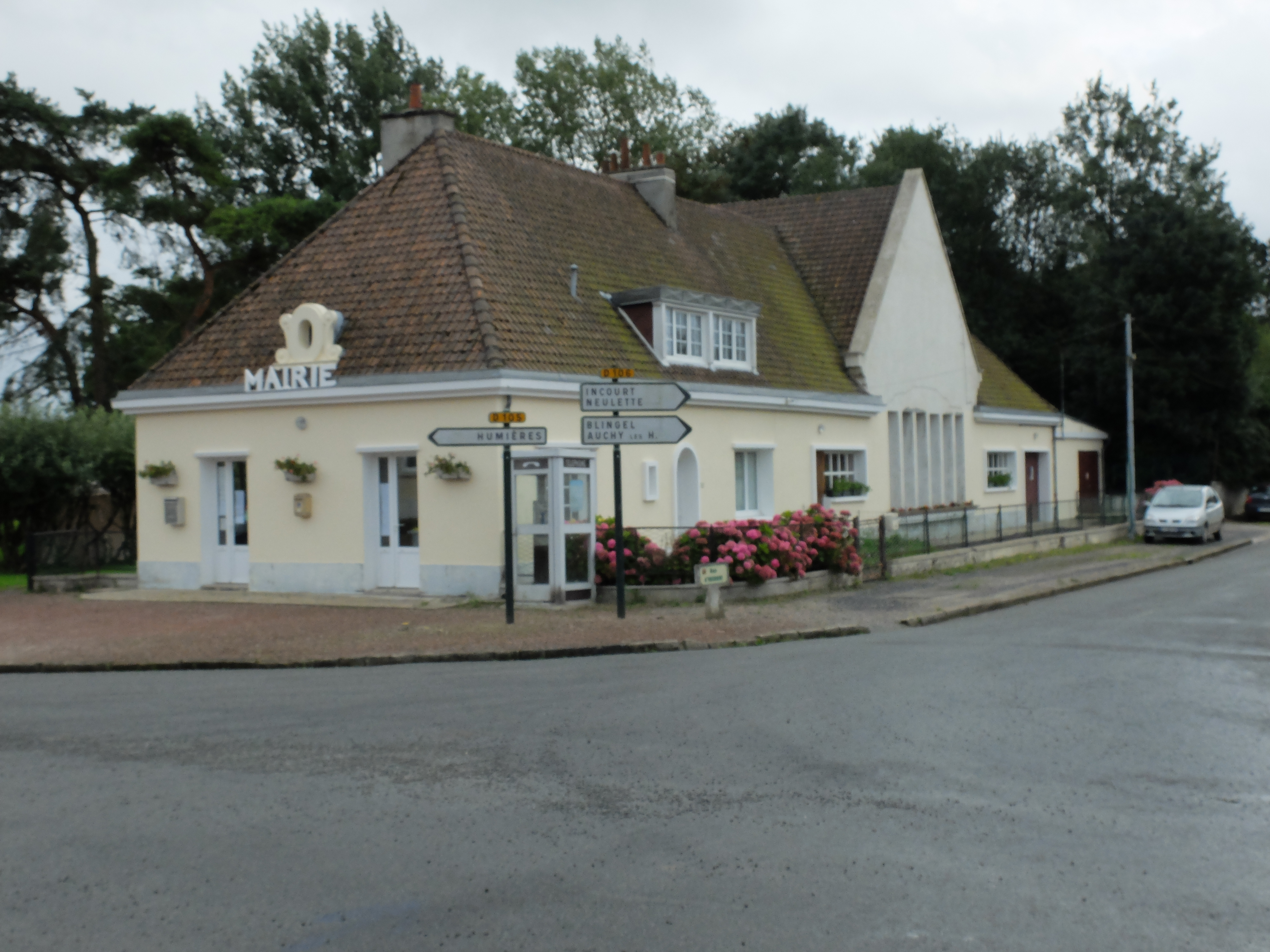 Vue de la mairie d'Éclimeux.